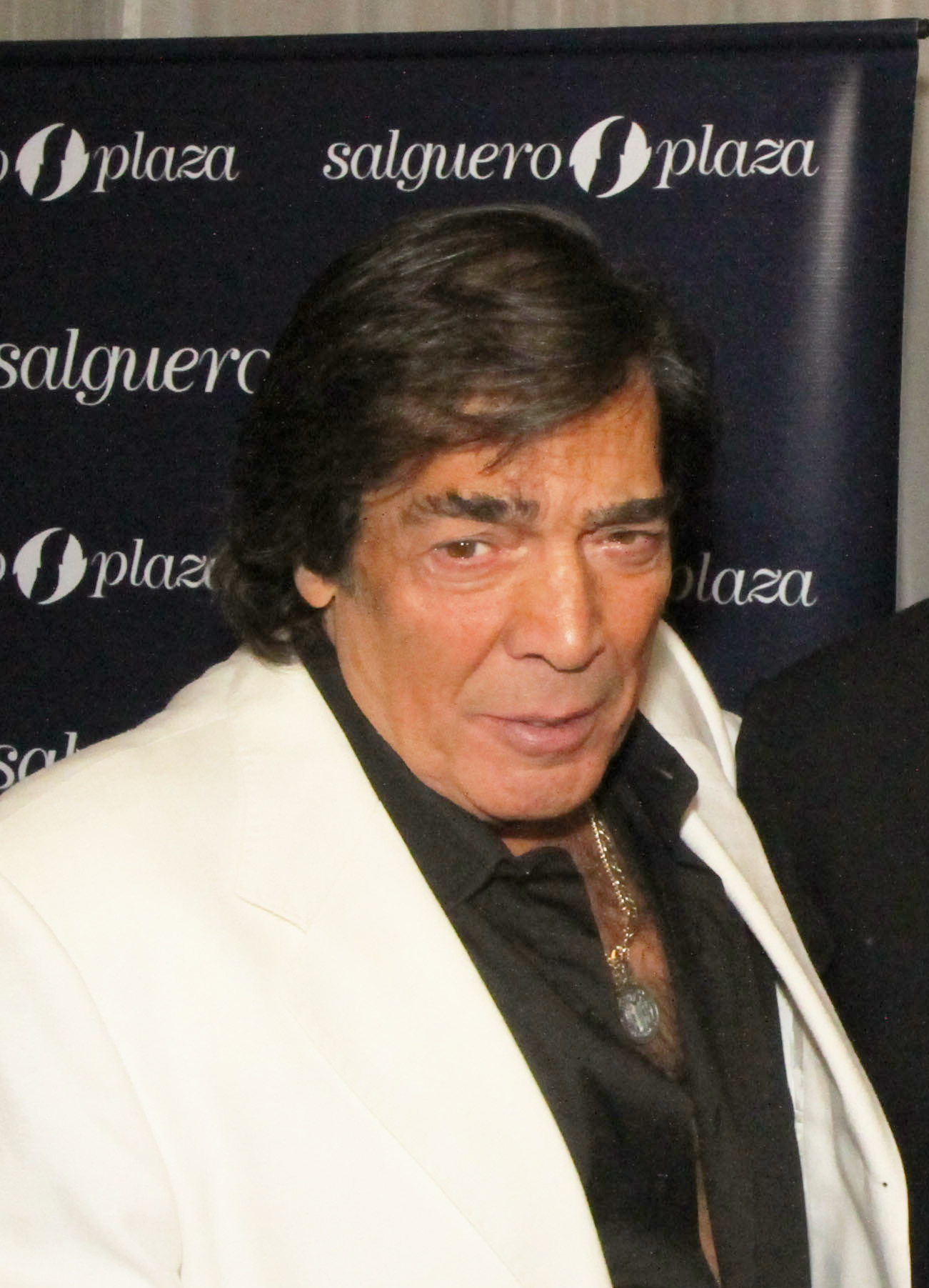 Cacho Castaña en 2012